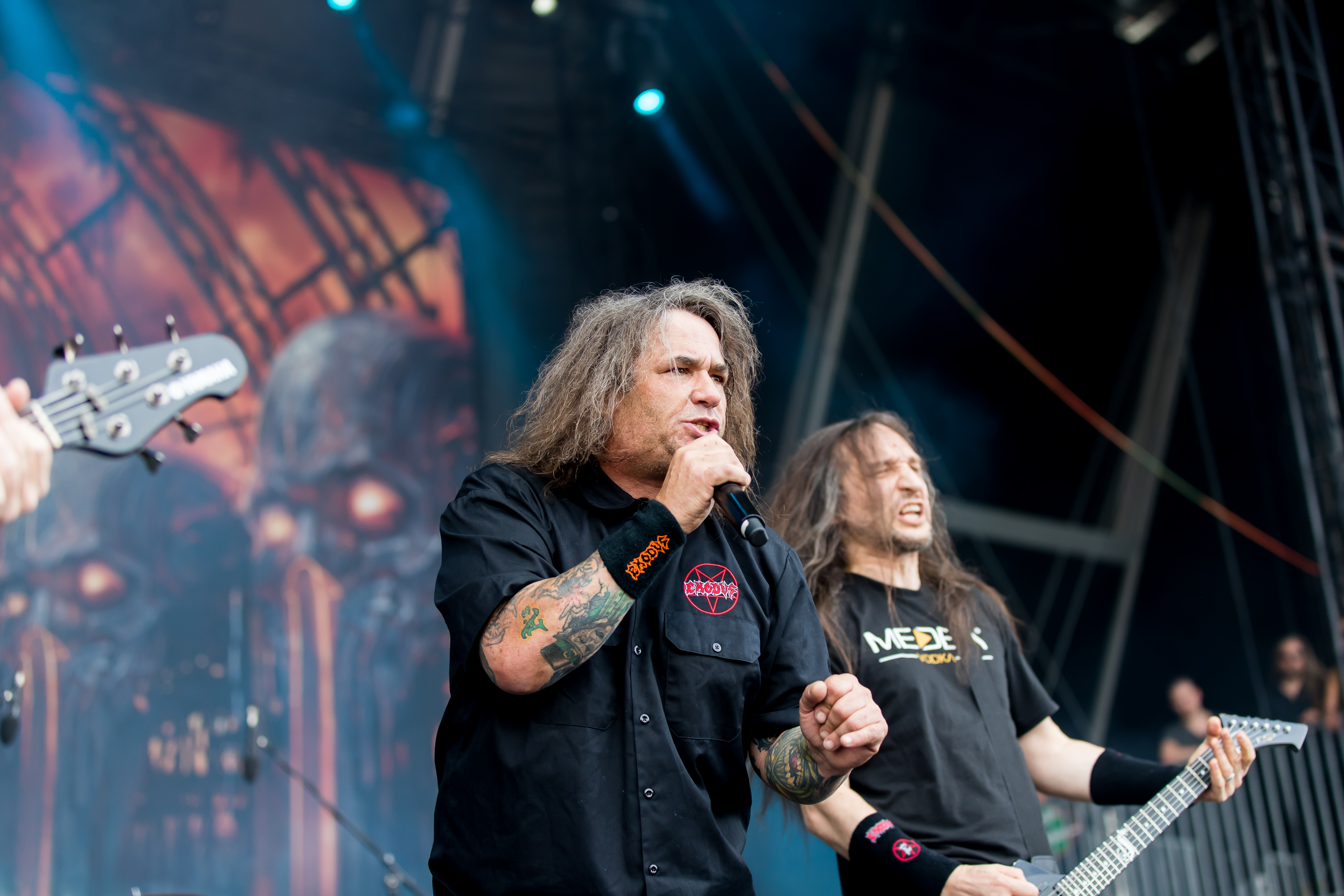 Exodus during Summer Breeze 2016 at , Dinkelsbühl, Bayern, Germany on 2016-08-18, Photo: Sven Mandel